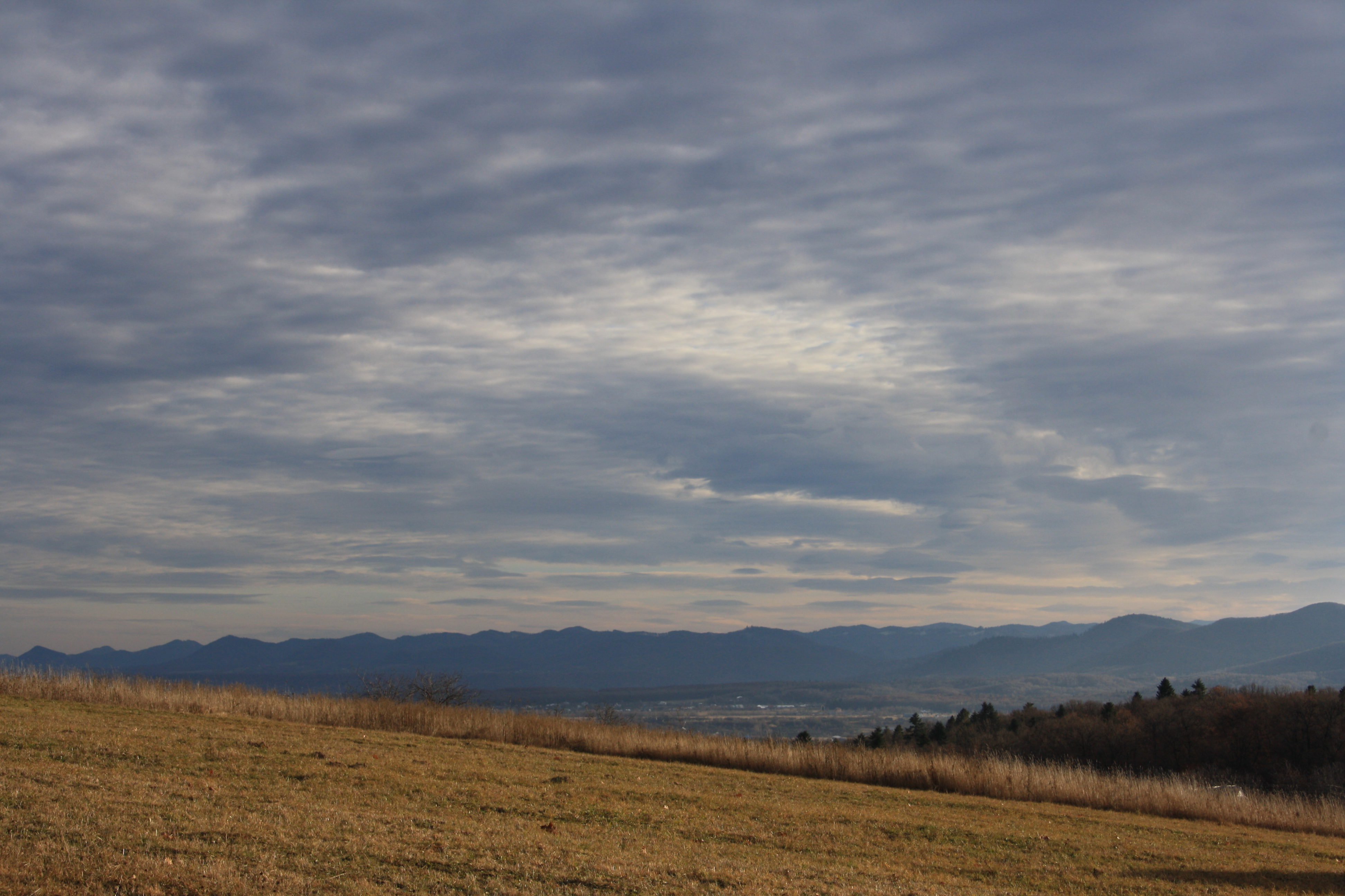 «Гуцульщина», Косівський район